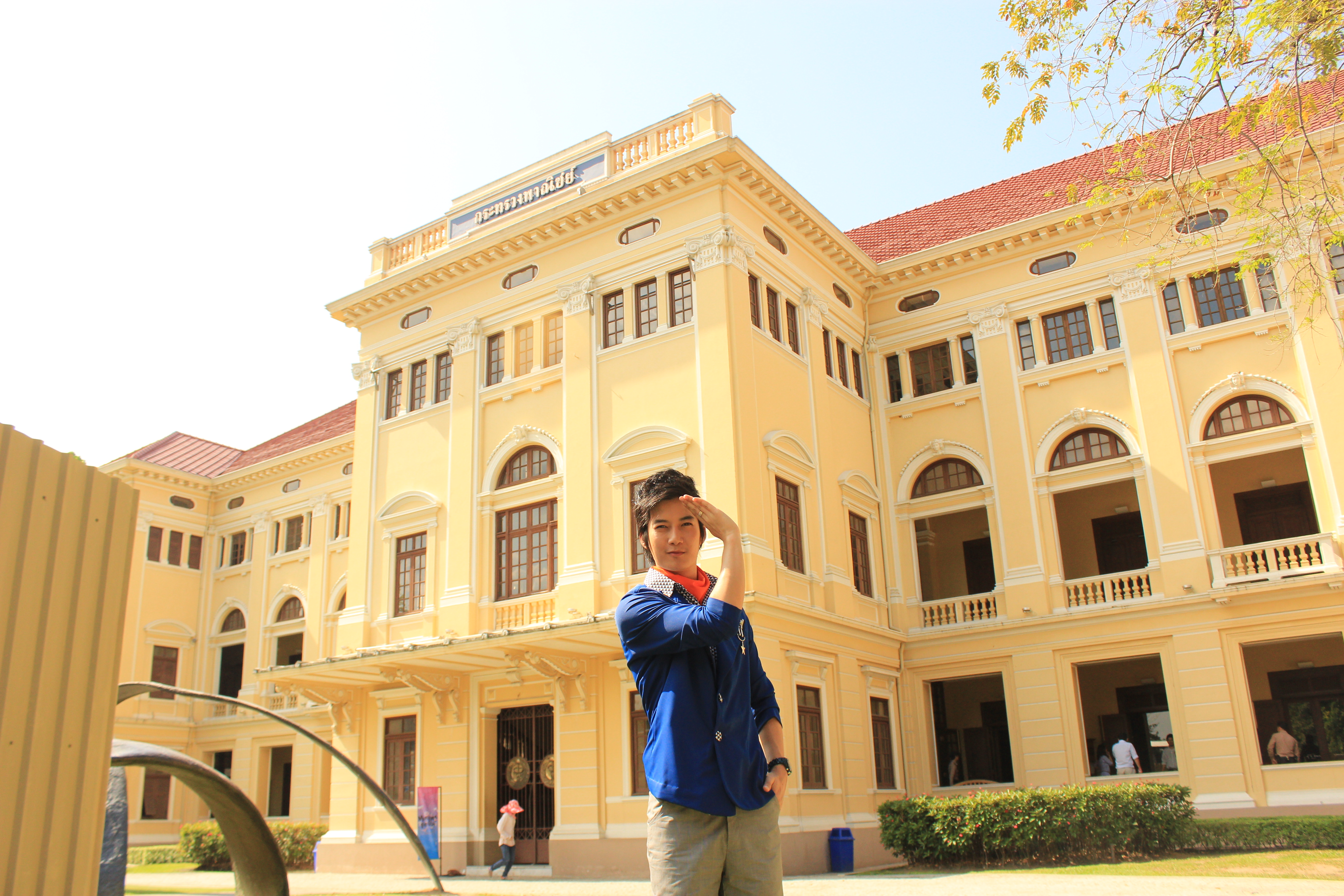 เชนธนา